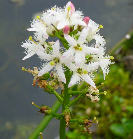 Bloem van Menyanthes trifoliata (Waterdrieblad). Foto genomen op 30 april 2005 te Kortrijk.